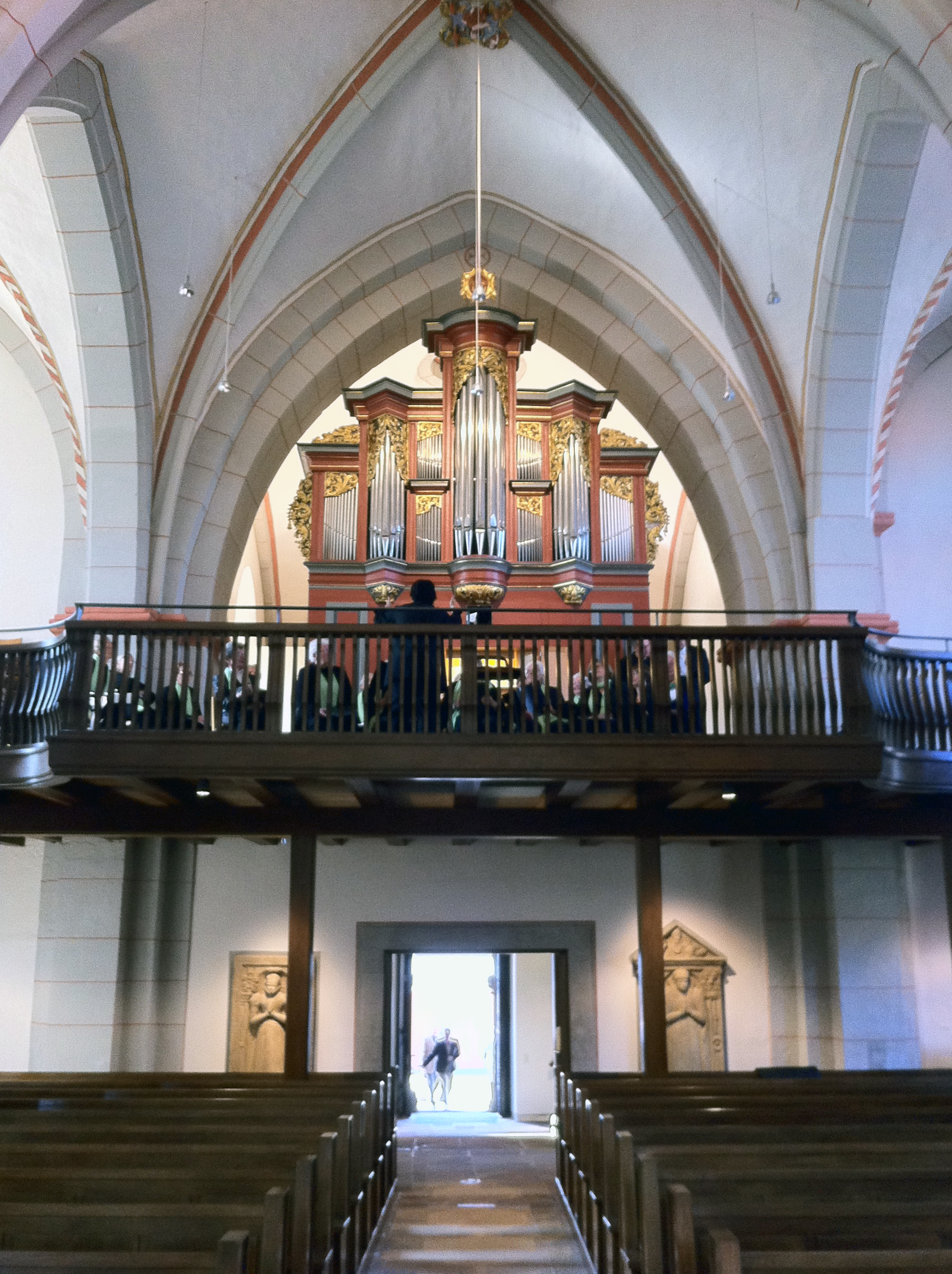 Lötzerich-Orgel, 2 Manuale, 27 Register, barocke DispositionThis is a photograph of an architectural monument.